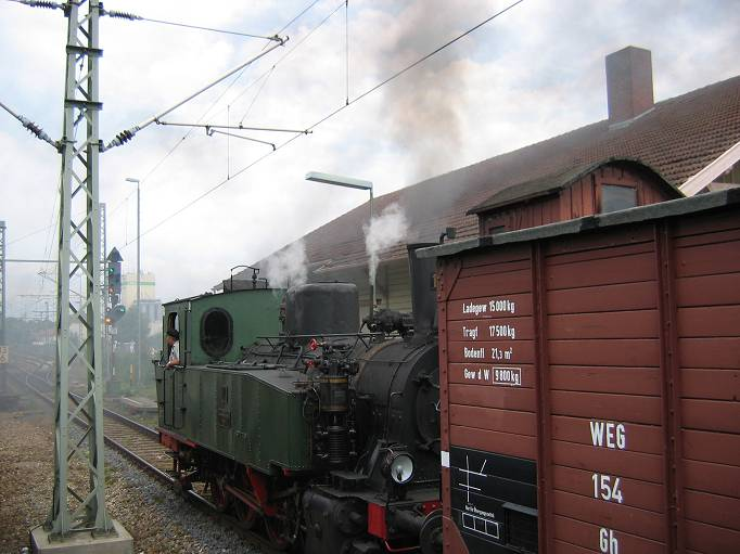 Historische Lokomotive GES Lok 11 – ehemalige Lok 11 der Hohenzollerischen Landesbahn (HZL) – auf der Murrtalbahn im Bahnhof von Marbach am Neckar.